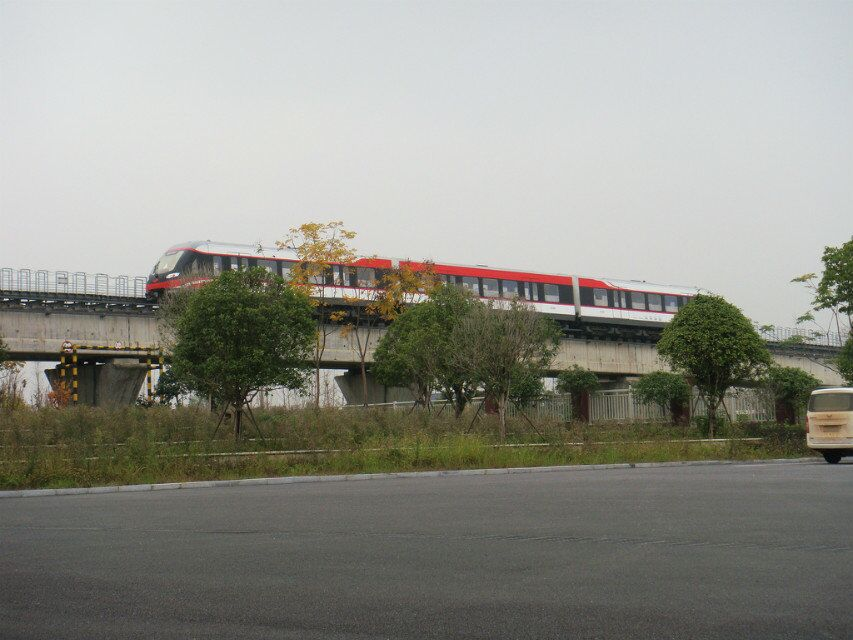 一列刚驶出磁浮榔梨站前往磁浮机场站的长沙中低速磁浮列车